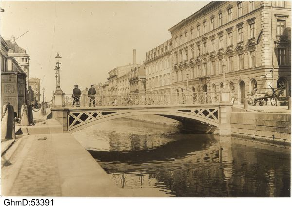 Köpmansgatubron över Östra Hamnkanalen i stadsdelen Nordstaden i Göteborg.